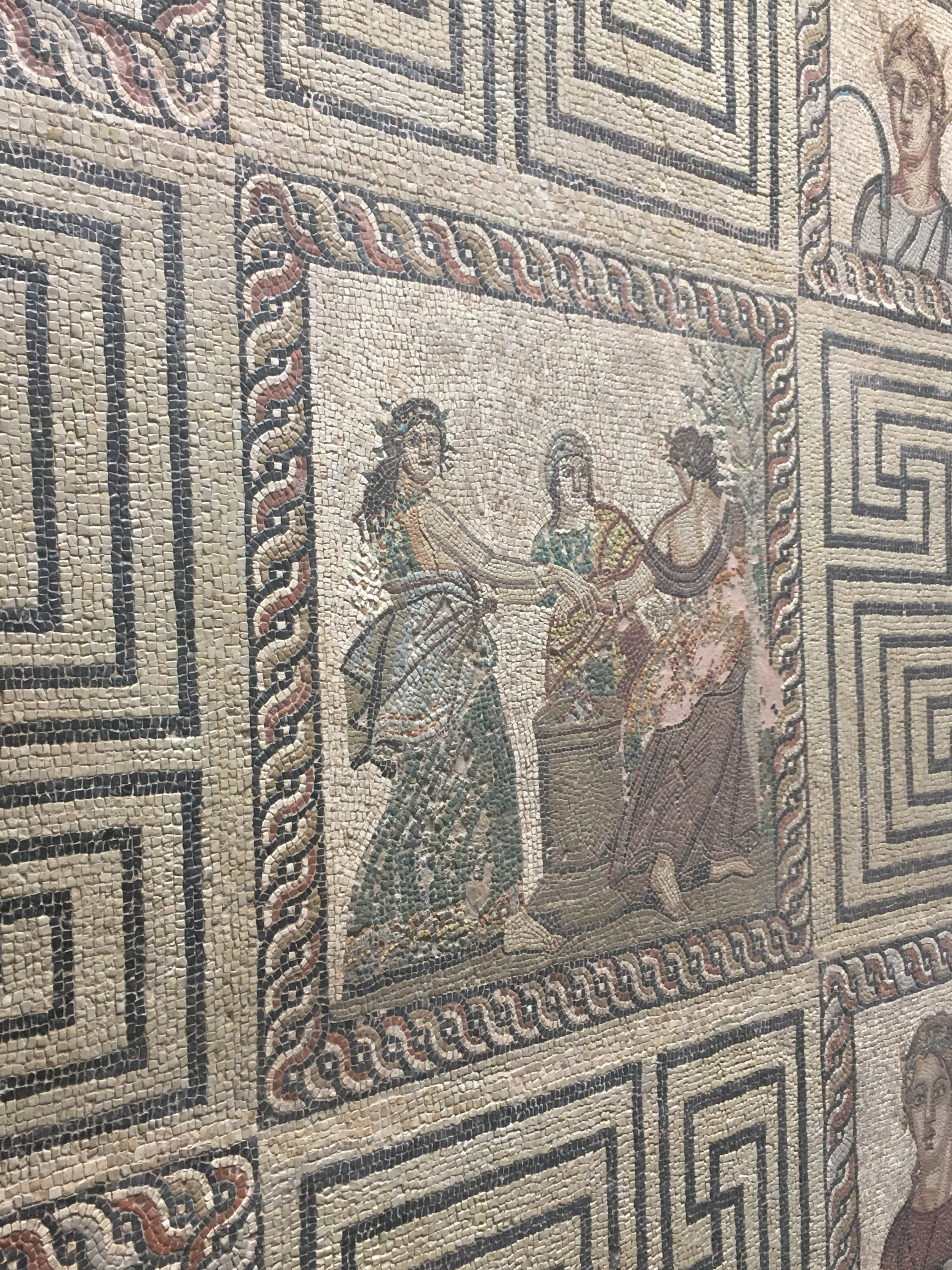 Κίσαμος«Κίσαμος»